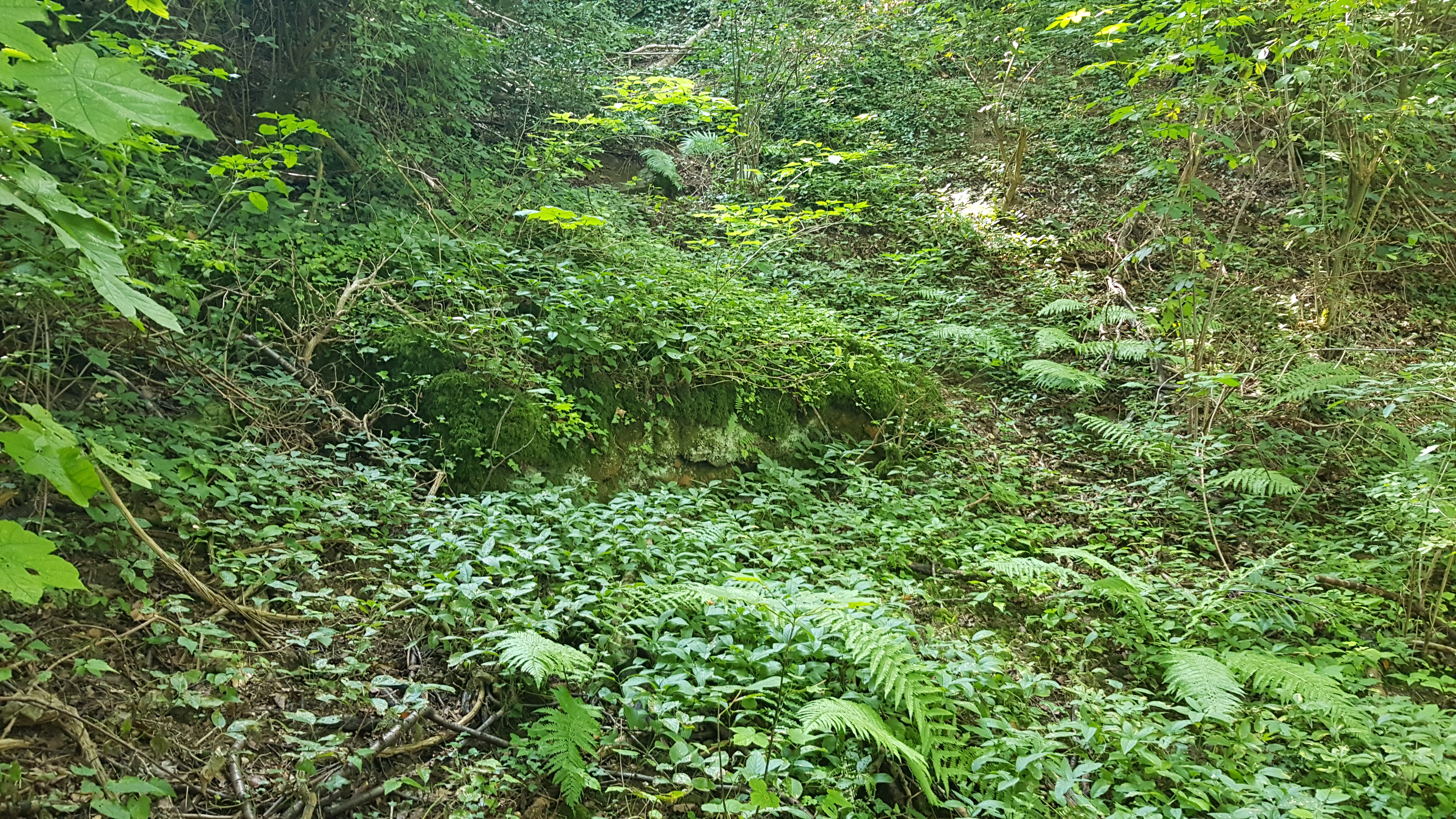 Groeve Pruus Karel I, Valkenburg, Nederland